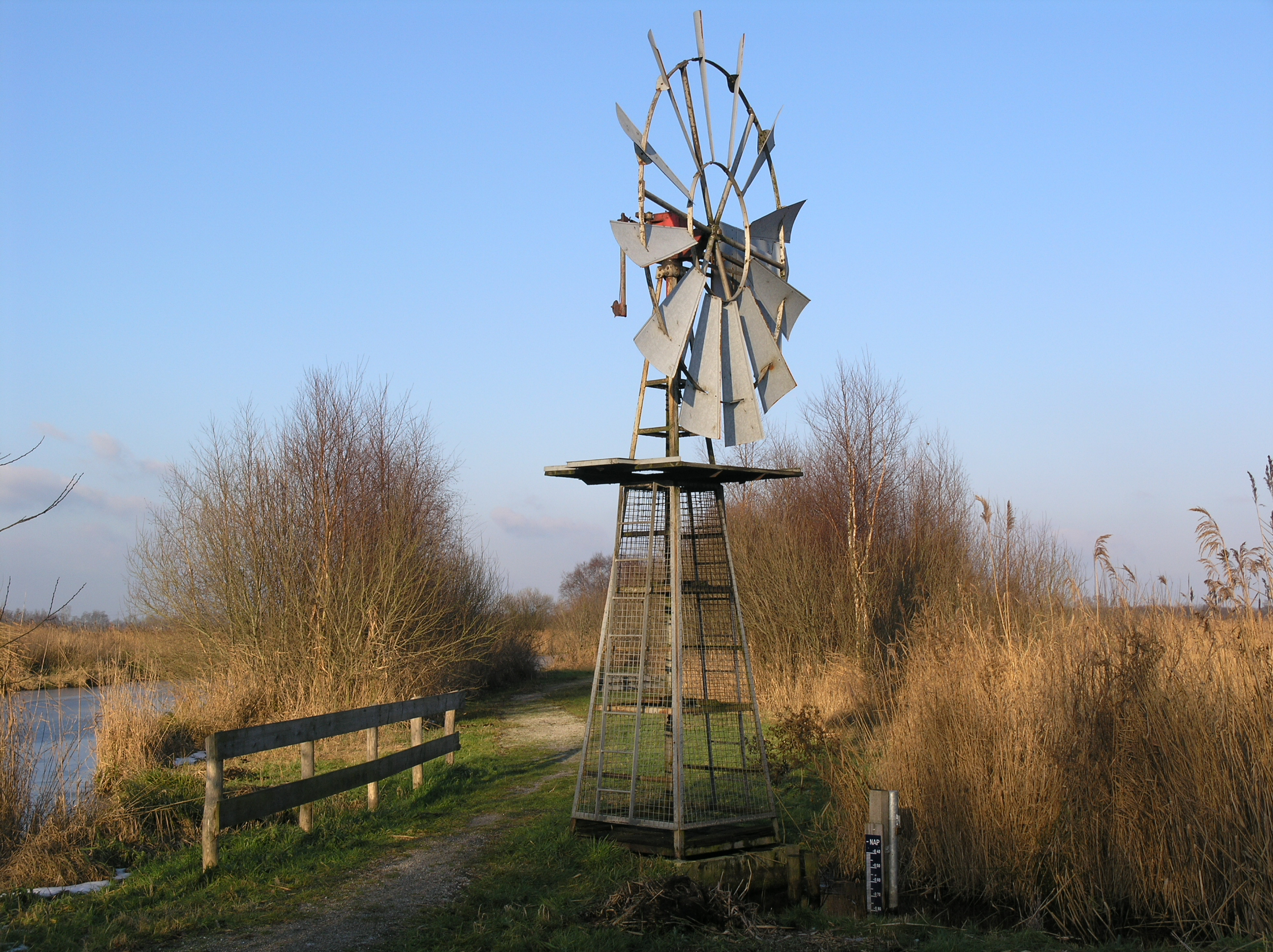 Nijetrijne Windmotor Poldermolen